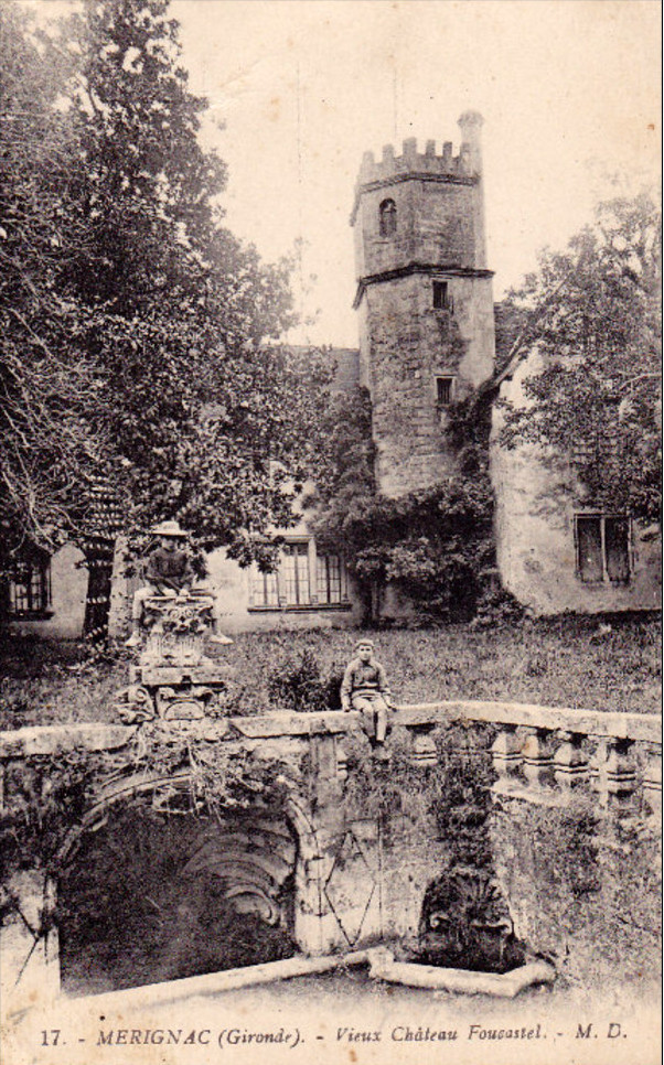 Mérignac on post-cards